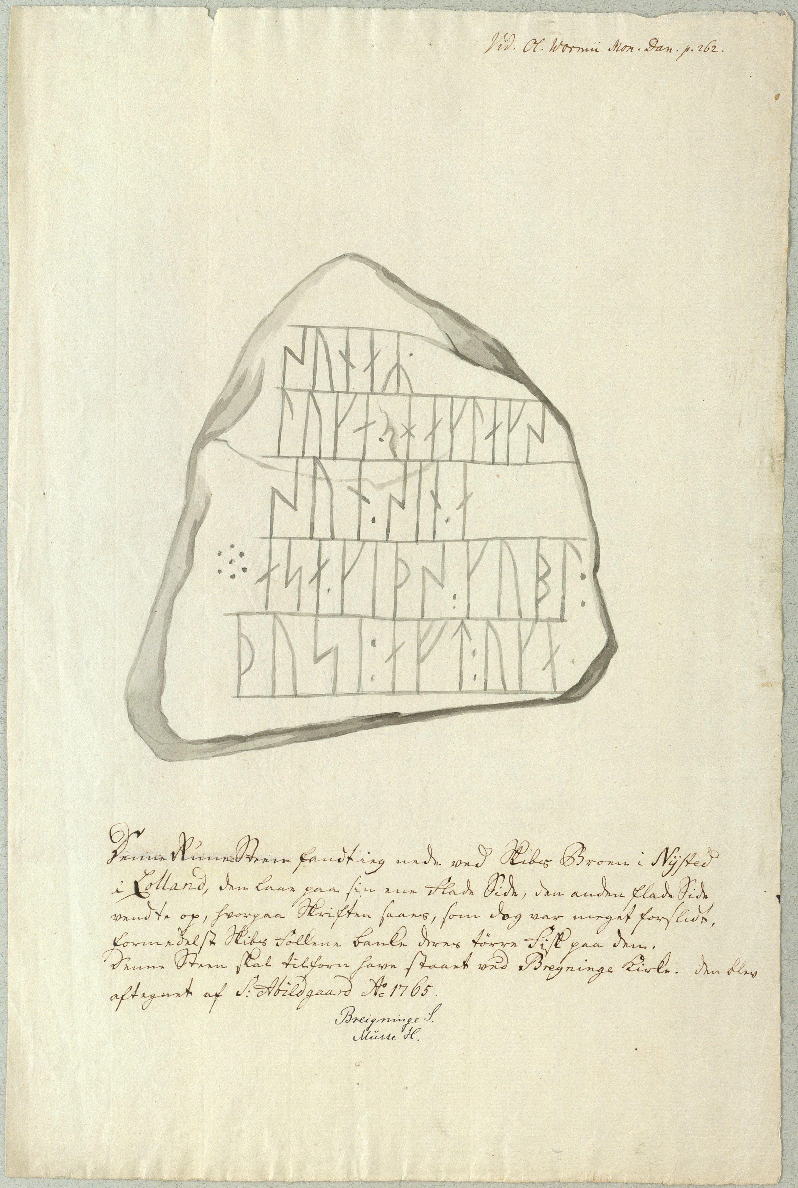 Denne Rune-Steen fandt ieg nede ved Skibs Broen i Nysted i Lolland, den laa paa sin ene flade Side, den anden flade Side vendte op, hvorpaa Skriften saaes, som dog var meget forslidt, formedelst Skibs Folkene banke deres tørre Fisk paa den. Denne Steen skal tilforn have staaet ved Bregninge Kirke. Den blev aftegnet af S: Abildgaard Ao 1765. 22 x 32 cm